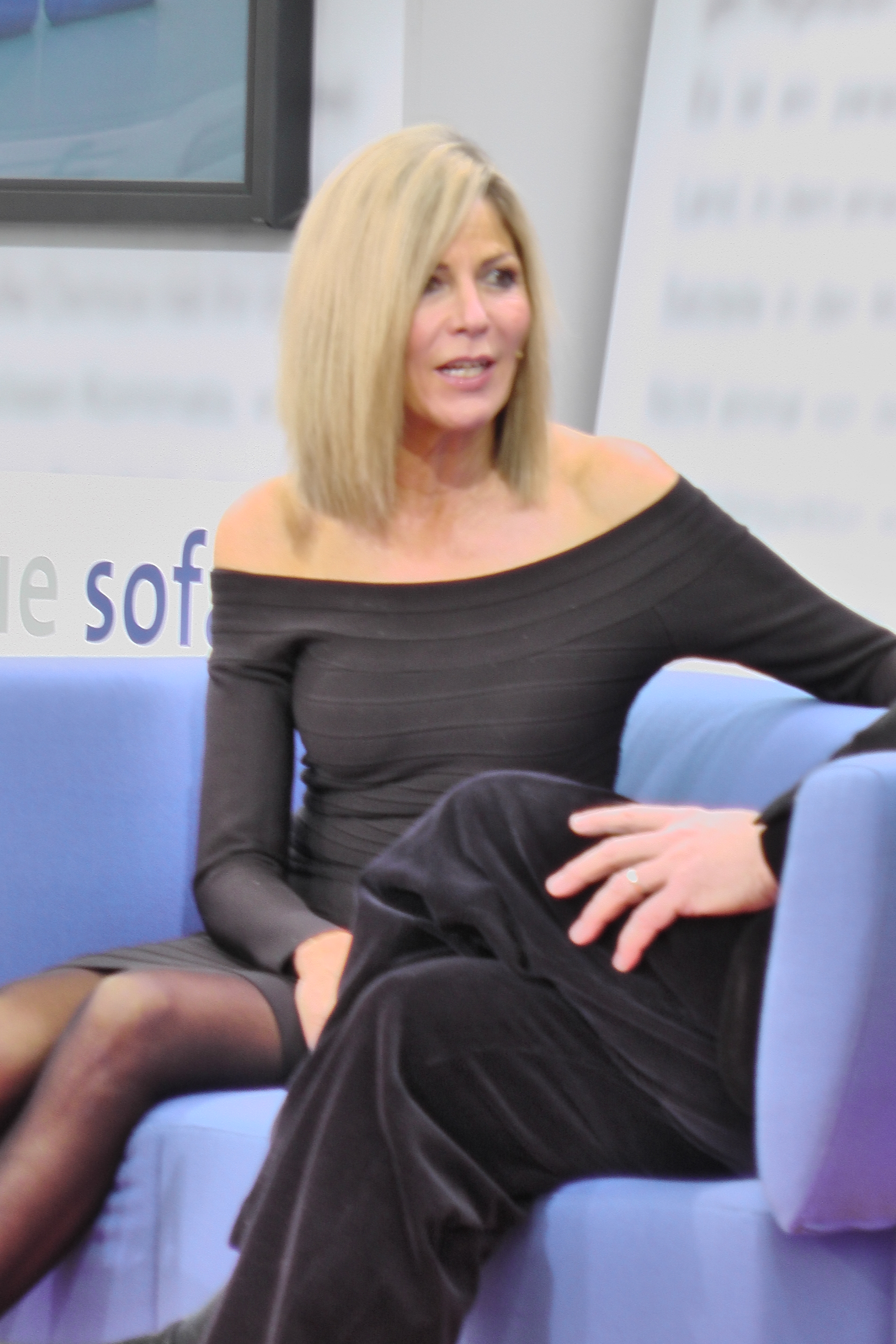 Schriftstellerin Eva Gesine Baur im Gespräch auf dem Blauen Sofa während der Leipziger Buchmesse 2012.